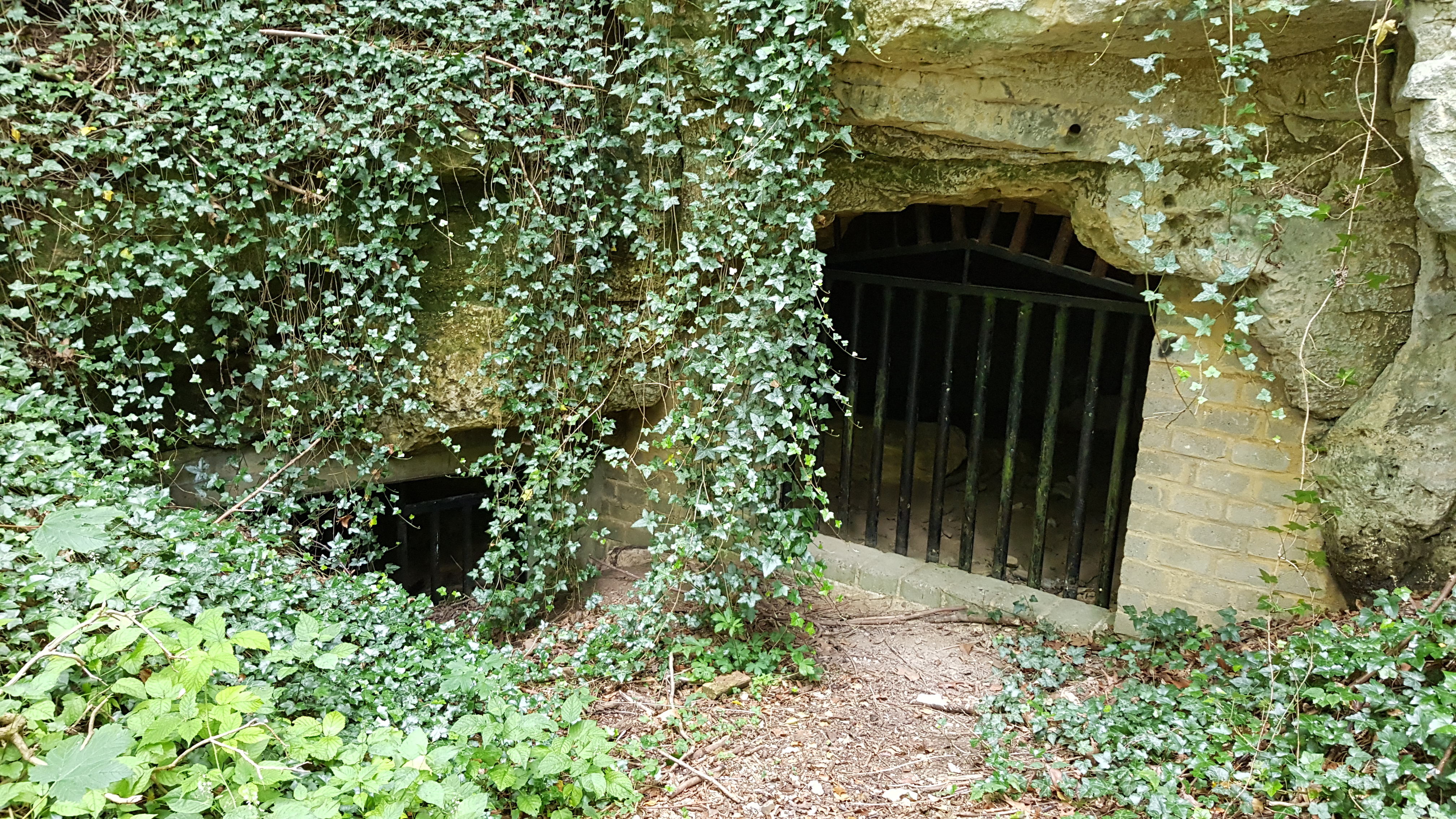 Groeve de Kleine Hel in het Savelsbos, Gronsveld, Nederland